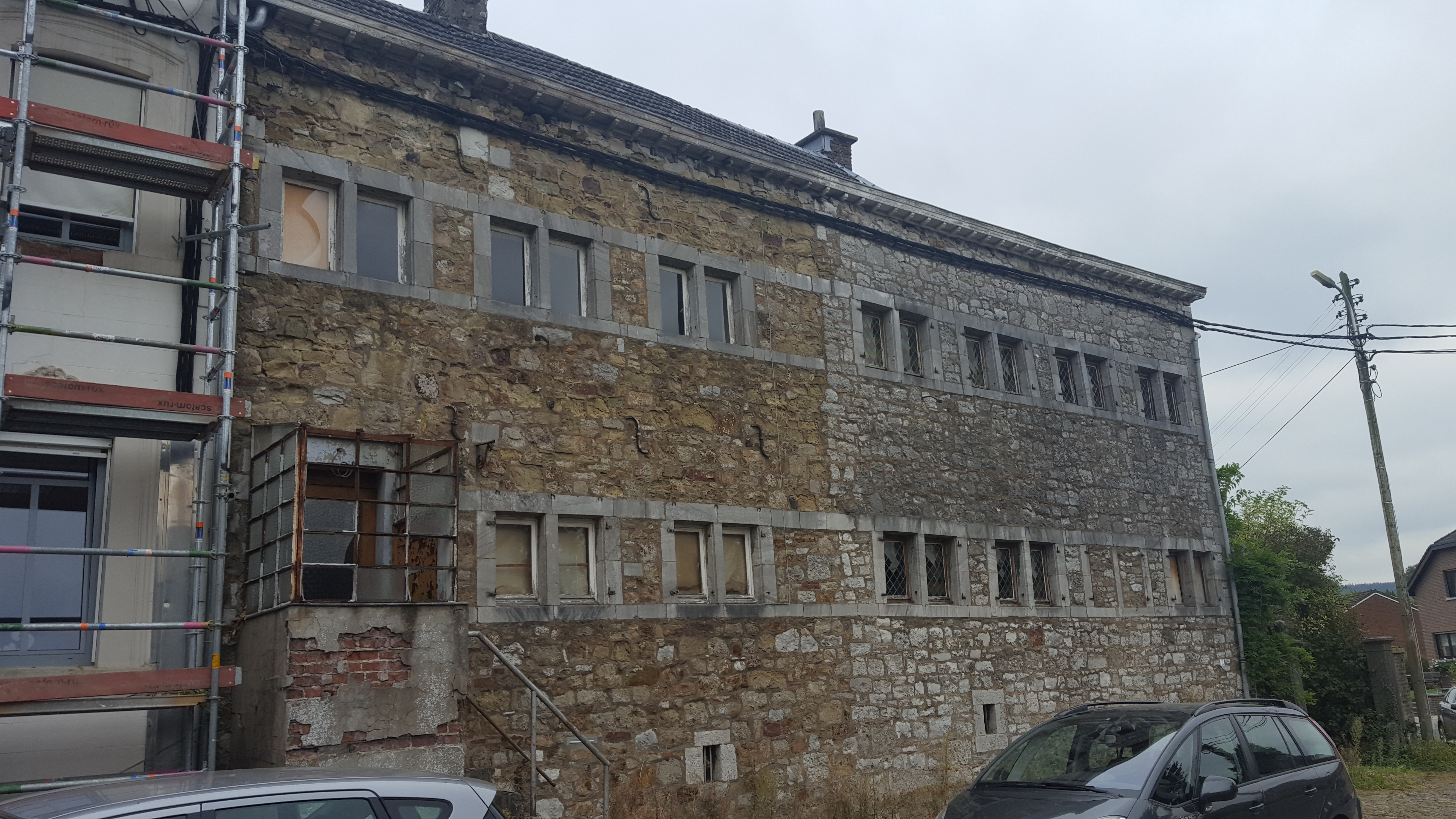 Cour de Cortembach, Membach, Baelen, Belgique